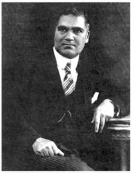 Hossein Kazemzadeh Iranshahr's (Persian: حسین کاظم‌زاده ایرانشهر) portrait